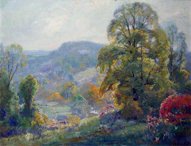 Landscape